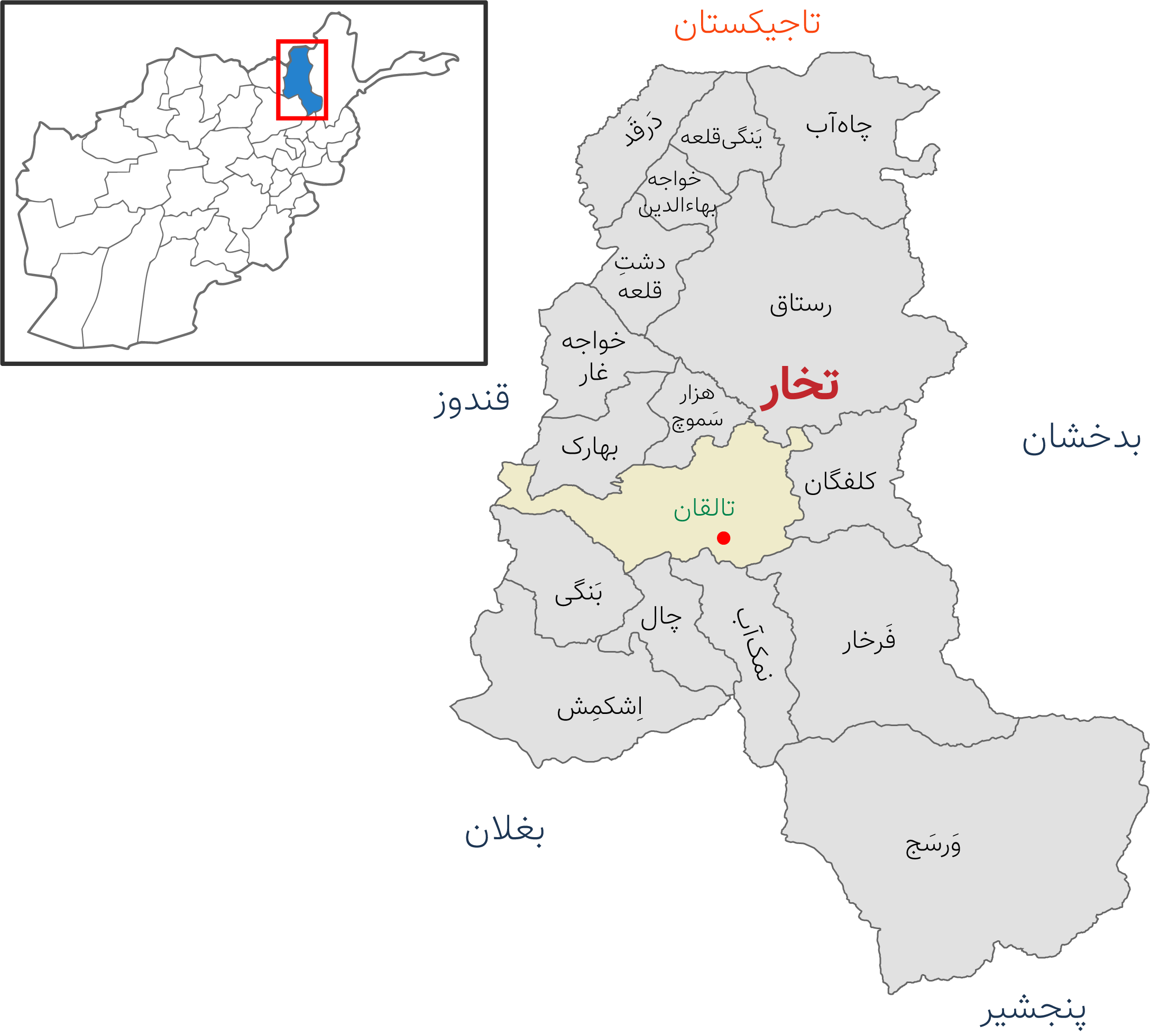 نقشه ولایت تخار